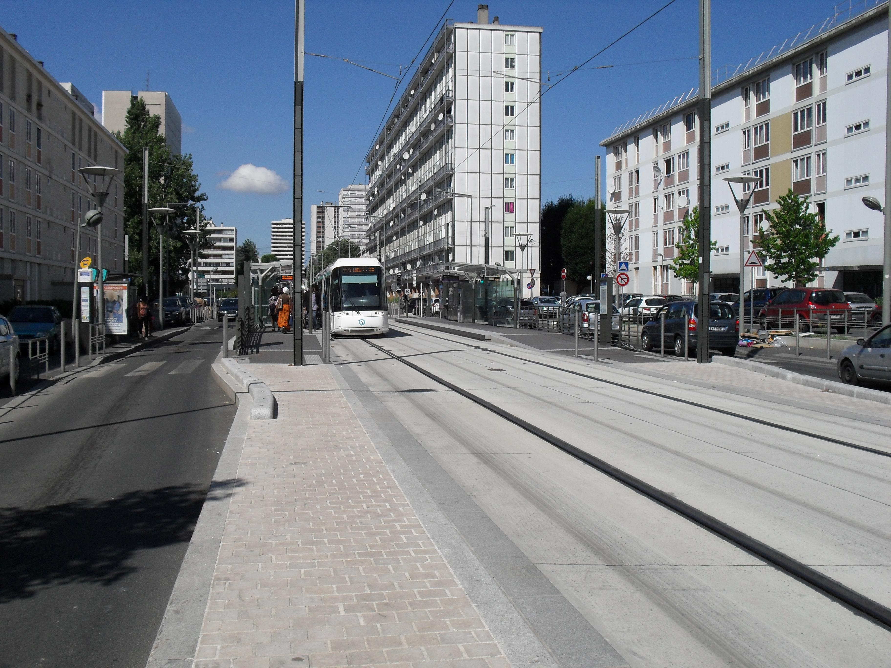 Une rame Translohr de la ligne T5 à la station "Paul Valéry".